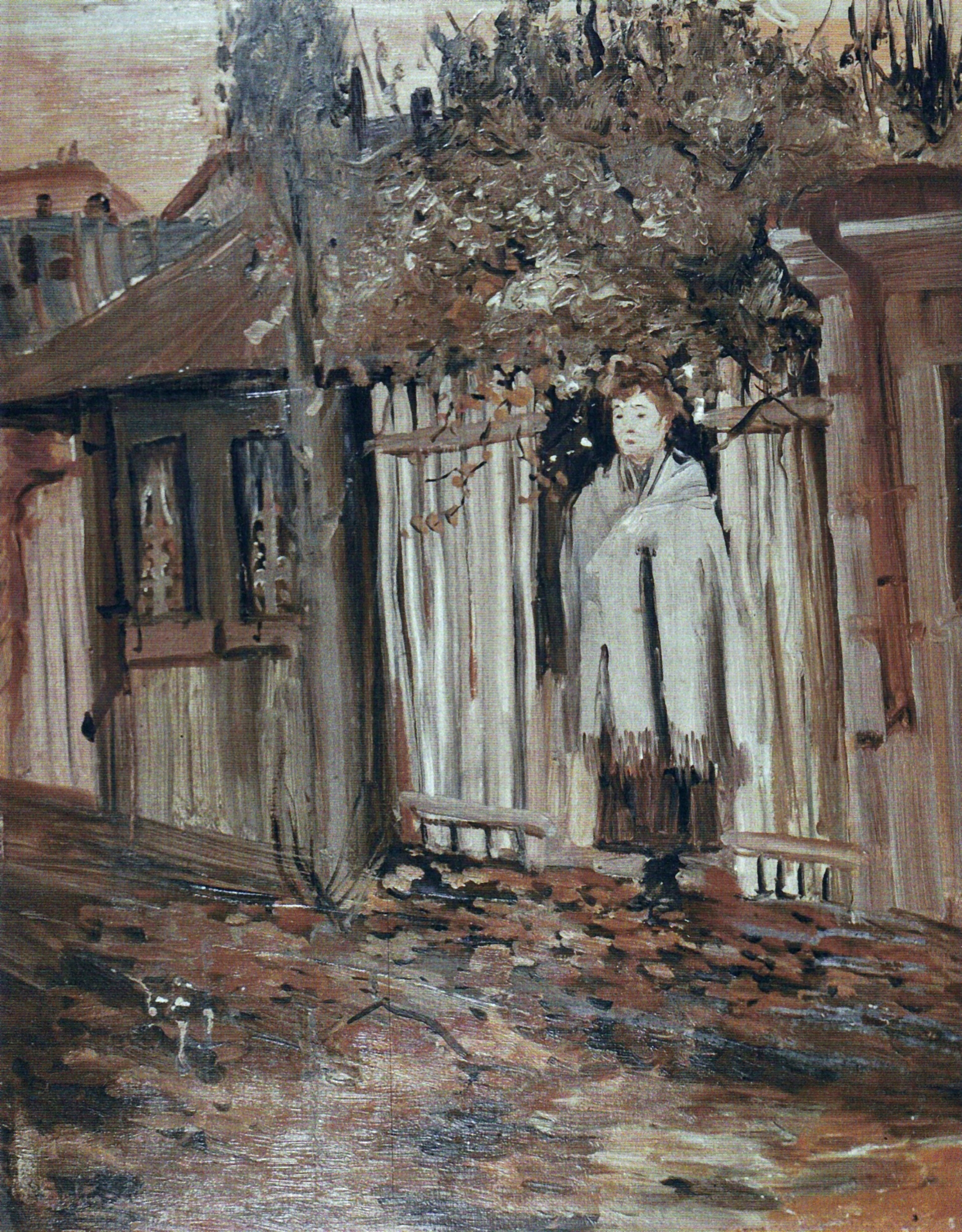 Muza mahalalei